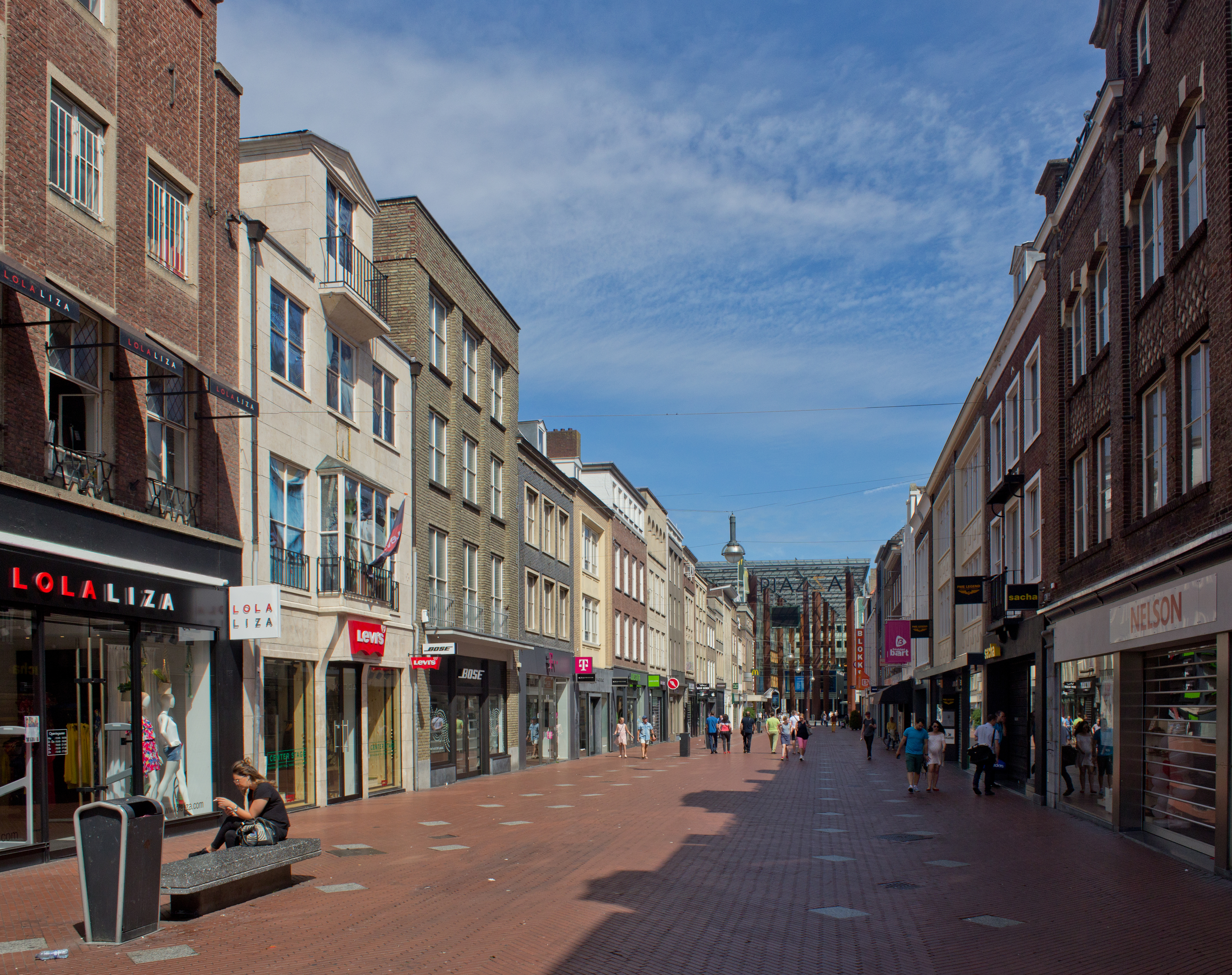 Een overzicht van de Demer te Eindhoven. Zicht richting het 18 Septemberplein.